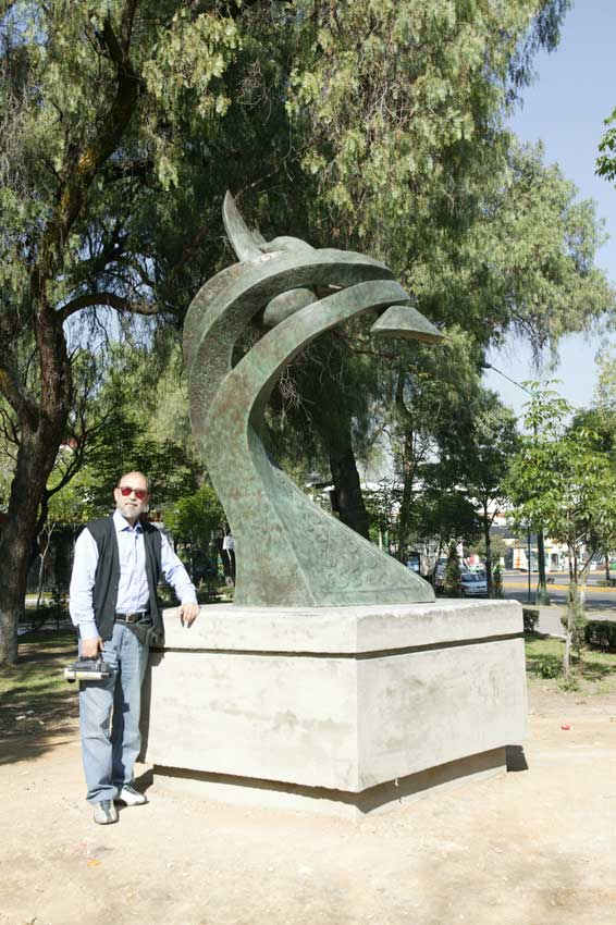 مجسم المملكة العربية السعودية و الموجود في مدينة مكسيكو سيتي